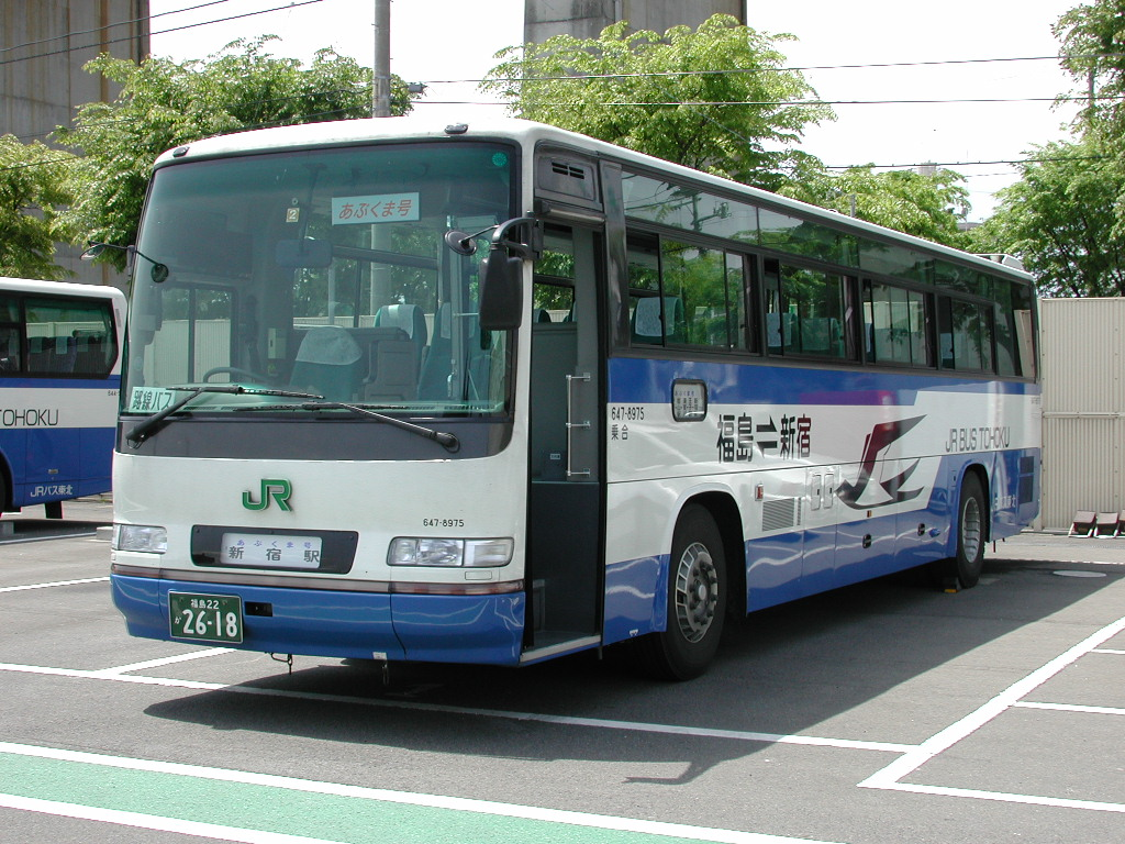 福島支店にて許可を得て撮影